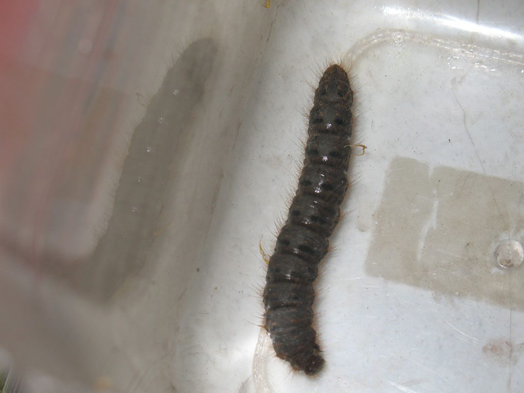 Exemplar found: Russia, Moscow Oblast, Orekhovo-Zuyevsky District, near station Antsiferovo, 26.06.2007, days МО, Орехово-Зуевский р-н, окрестности станции Анциферово, 26.06.2007, днём